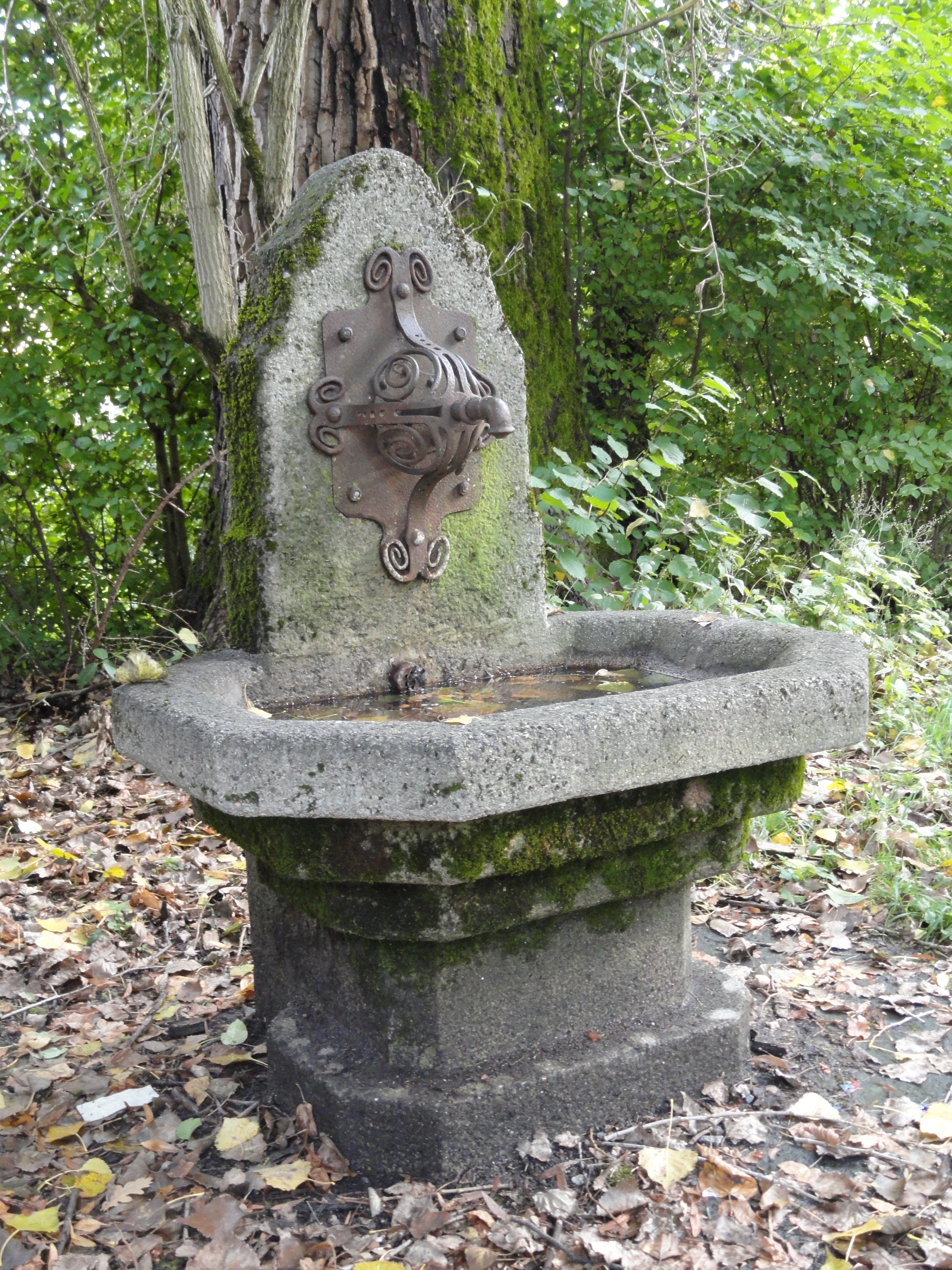 Vergessener Brunnen im Calgeer-Park, Kempten im Allgäu